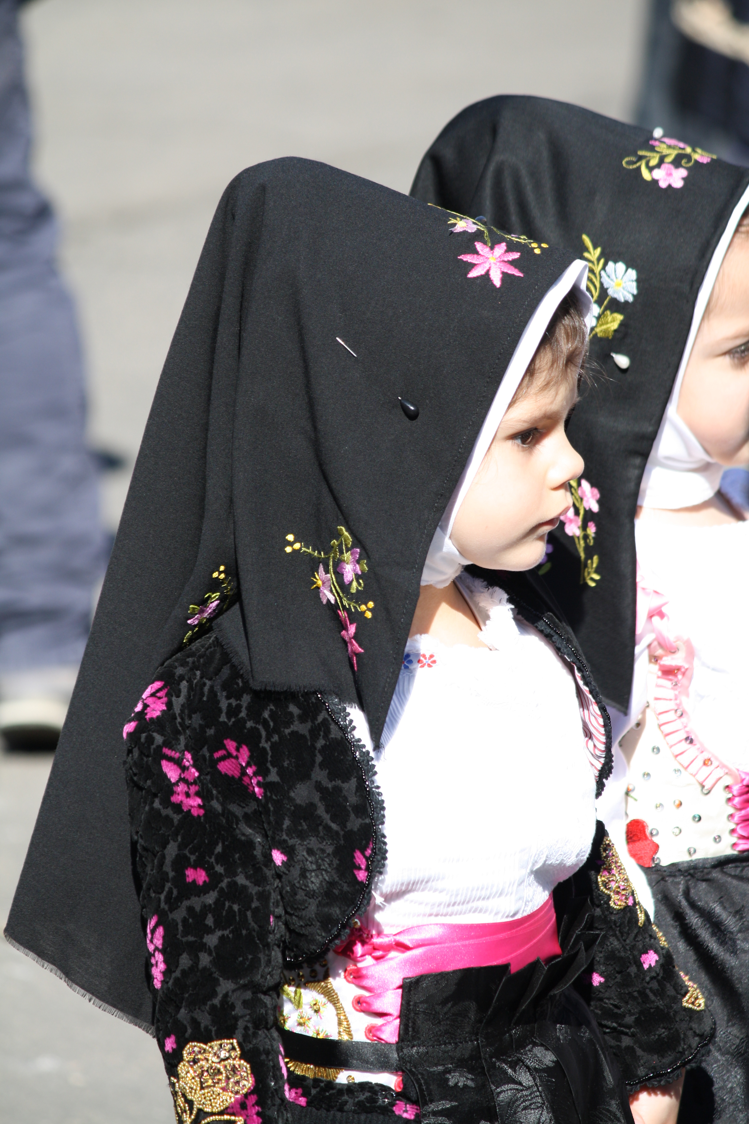 sardinian people sardinians sardi folk sardinia island sardegna sardinia sardaigne cerdeña sardinien abiti tradizionali costumi gente persone cavalcata sarda